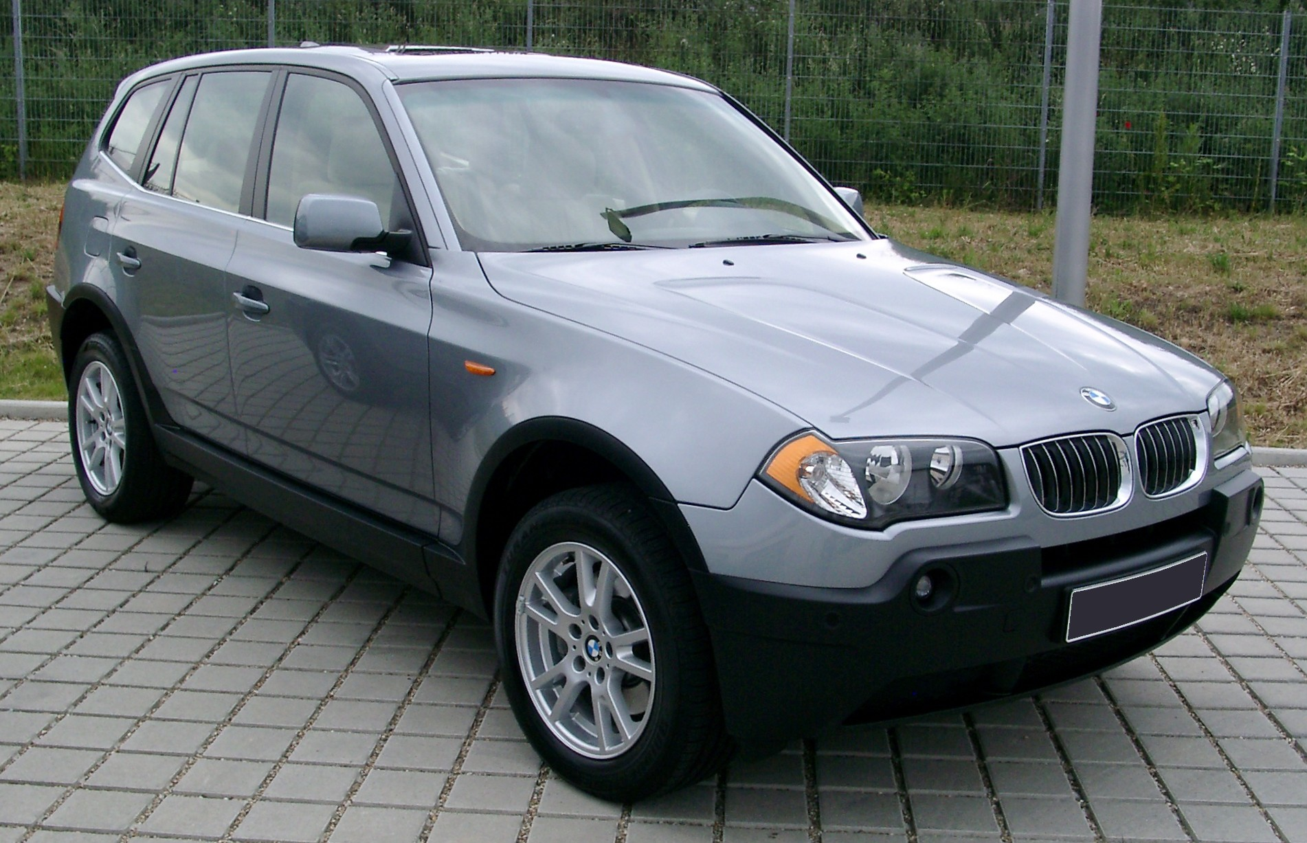 BMW X3